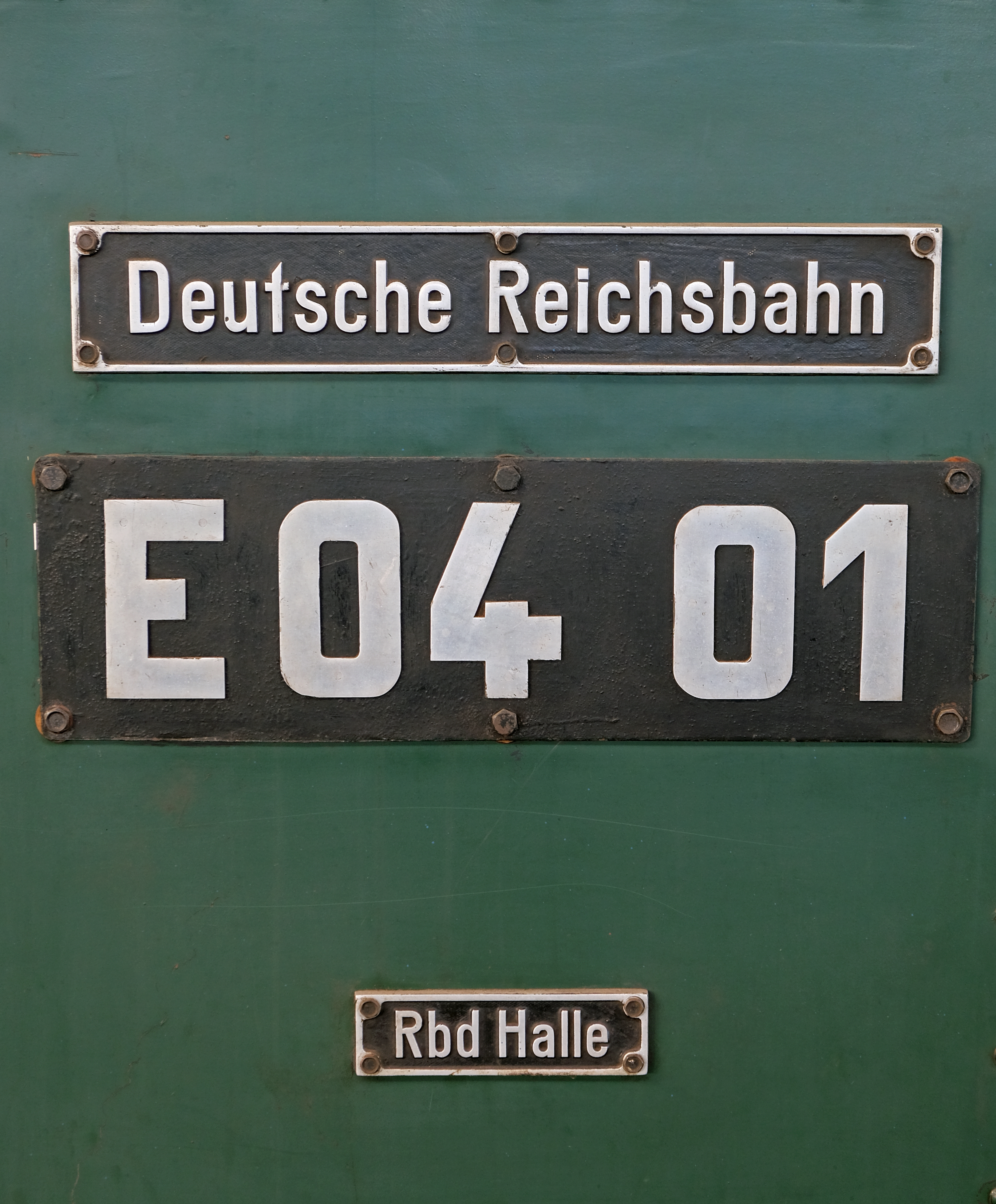 Lokschilder E04 01 der DR, Rbd Halle